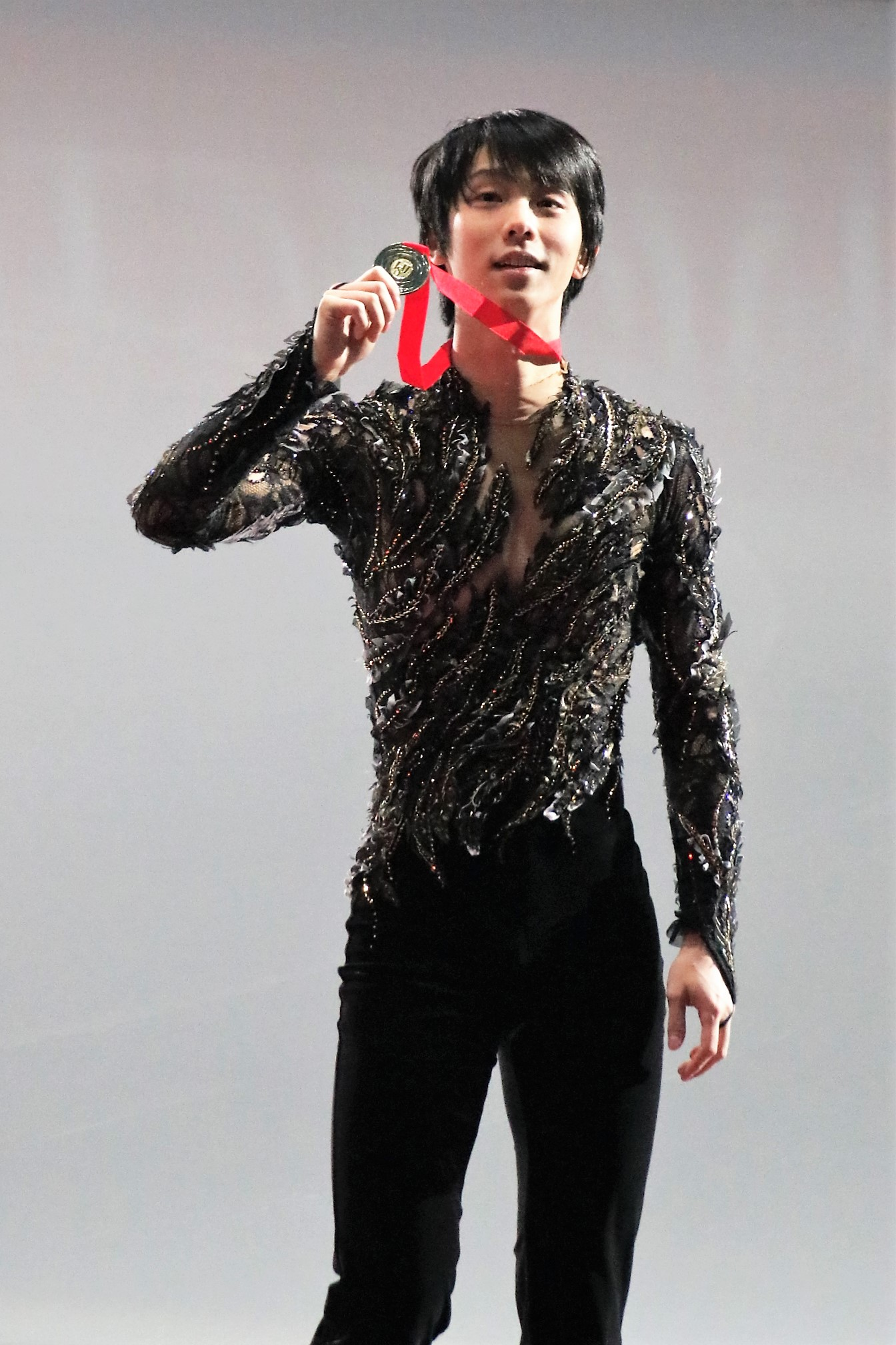 Юдзуру Ханю (Япония) на церемонии награждения Rostelecom Cup 2018